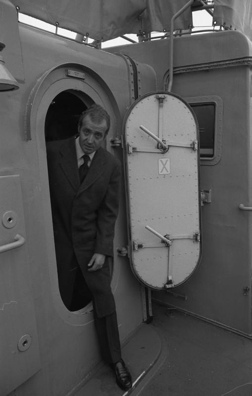 Staatsbesuch König Juan Carlos I. und Königin Sofia von Spanien in der Bundesrepublik Deutschland (21.4.) Bremerhaven: Besuch auf dem Zerstörer Hessen. 19.-23.4.1977